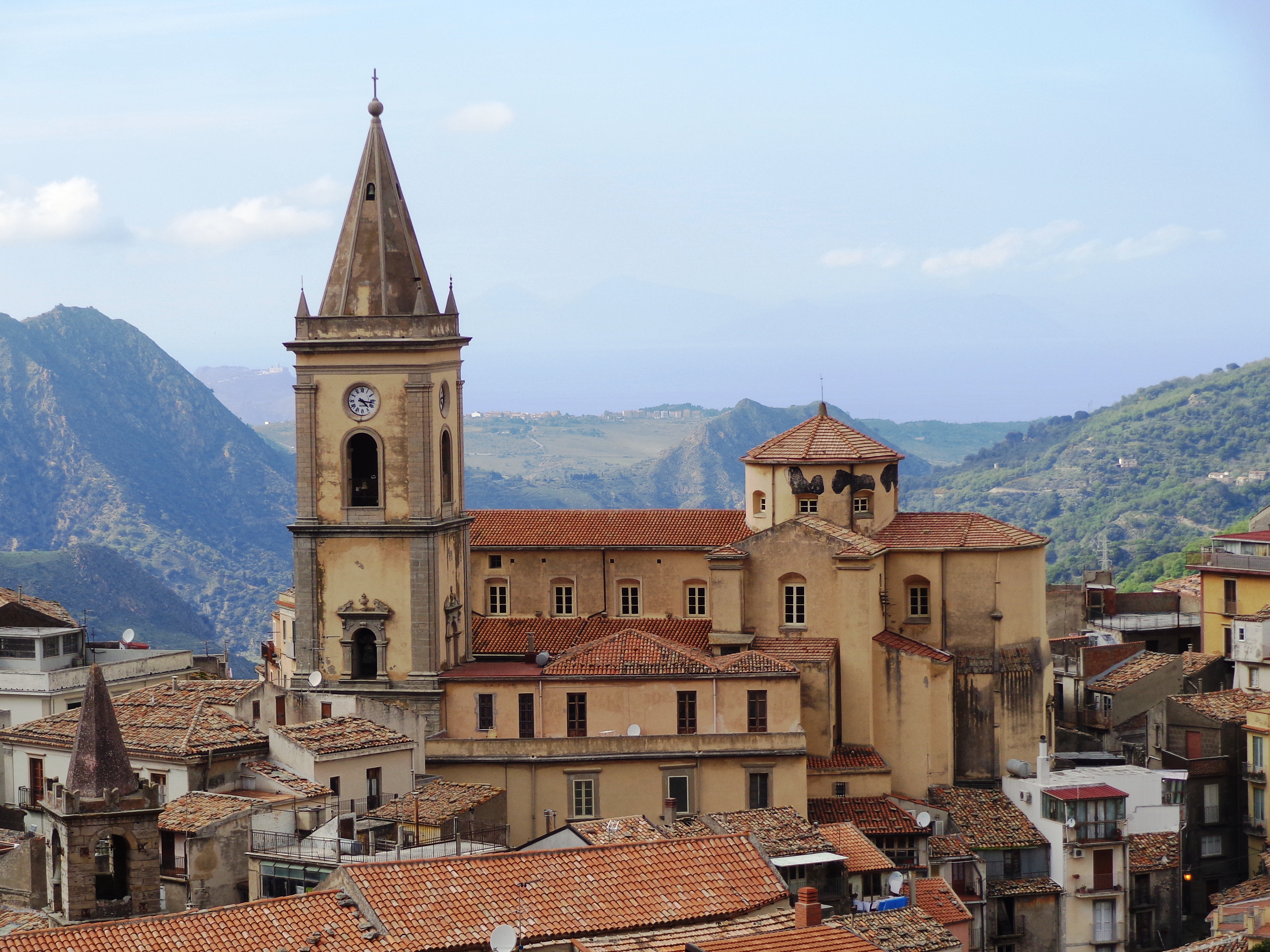 Duomo di Novara di Sicilia esterno